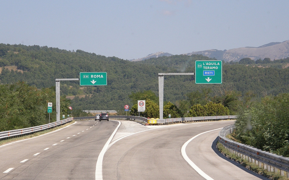 Autostrada A25 ende in die A24